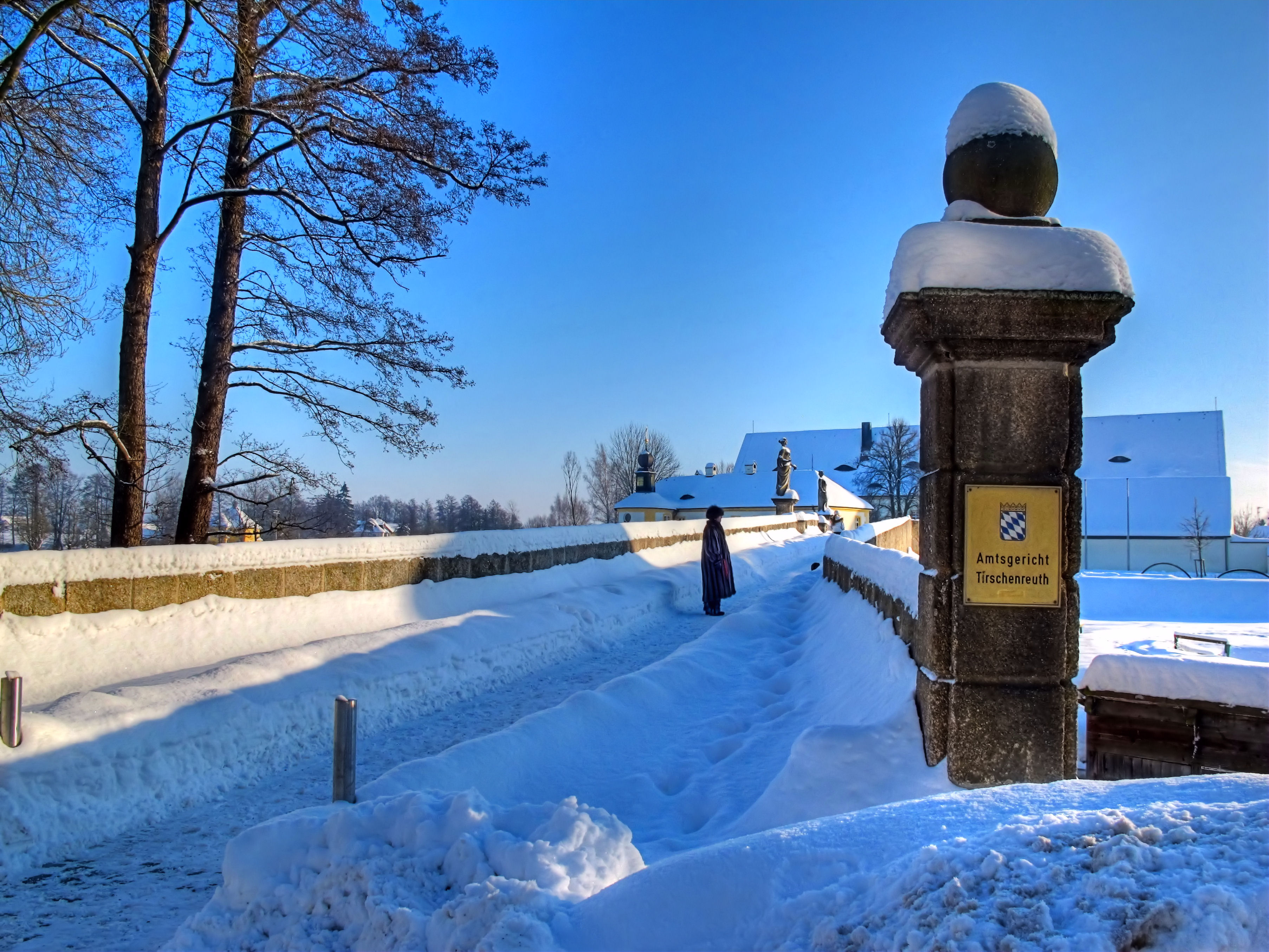 Deutschland, Bayern, Oberpfalz, Tirschenreuth, Amtsgericht, Am Fischerweg